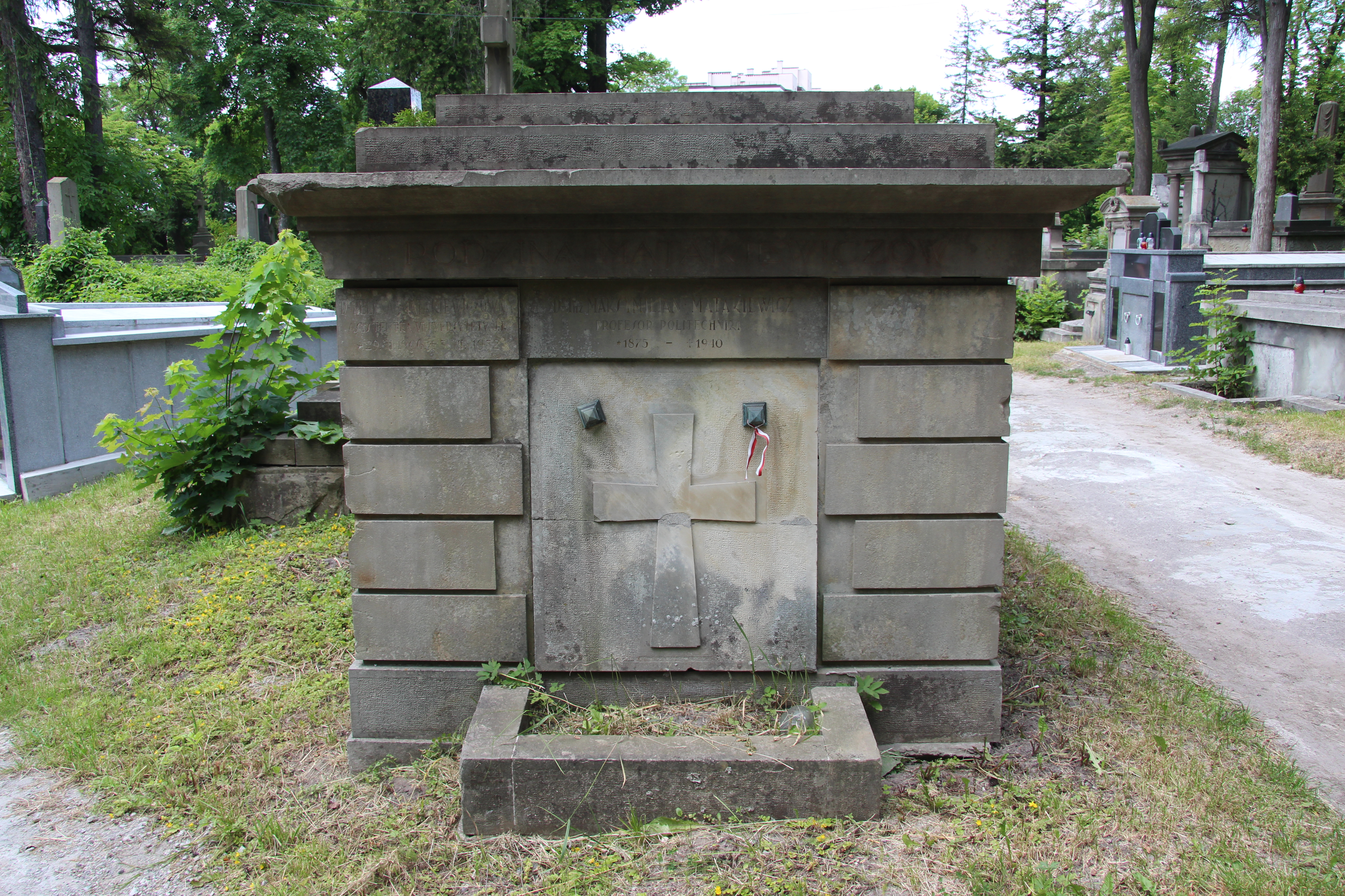 Гробівець родини Матакевичів.Личаківський цвинтар , поле № 71.